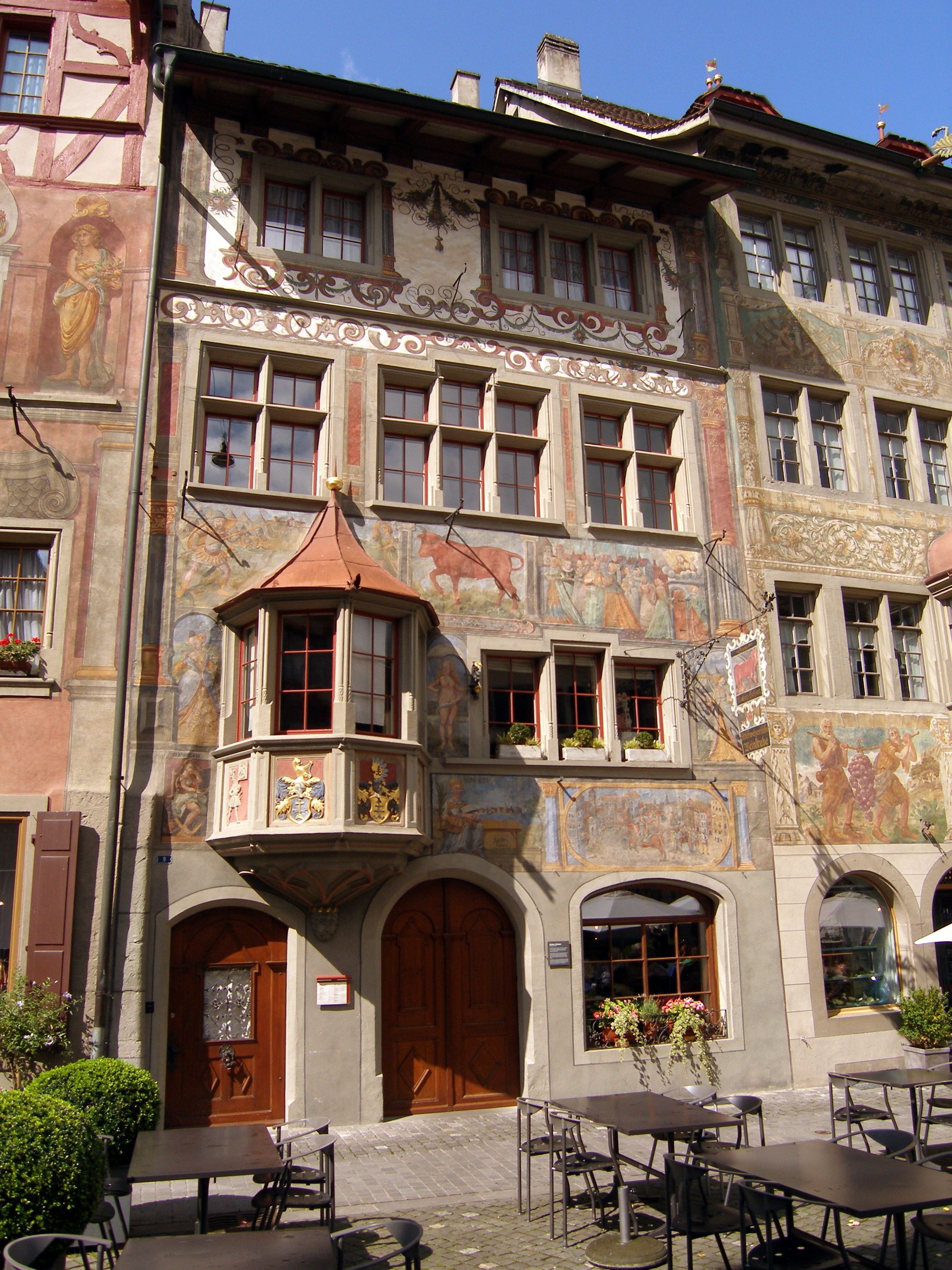 Roter Ochsen, a former guest house in Stein am Rhein.